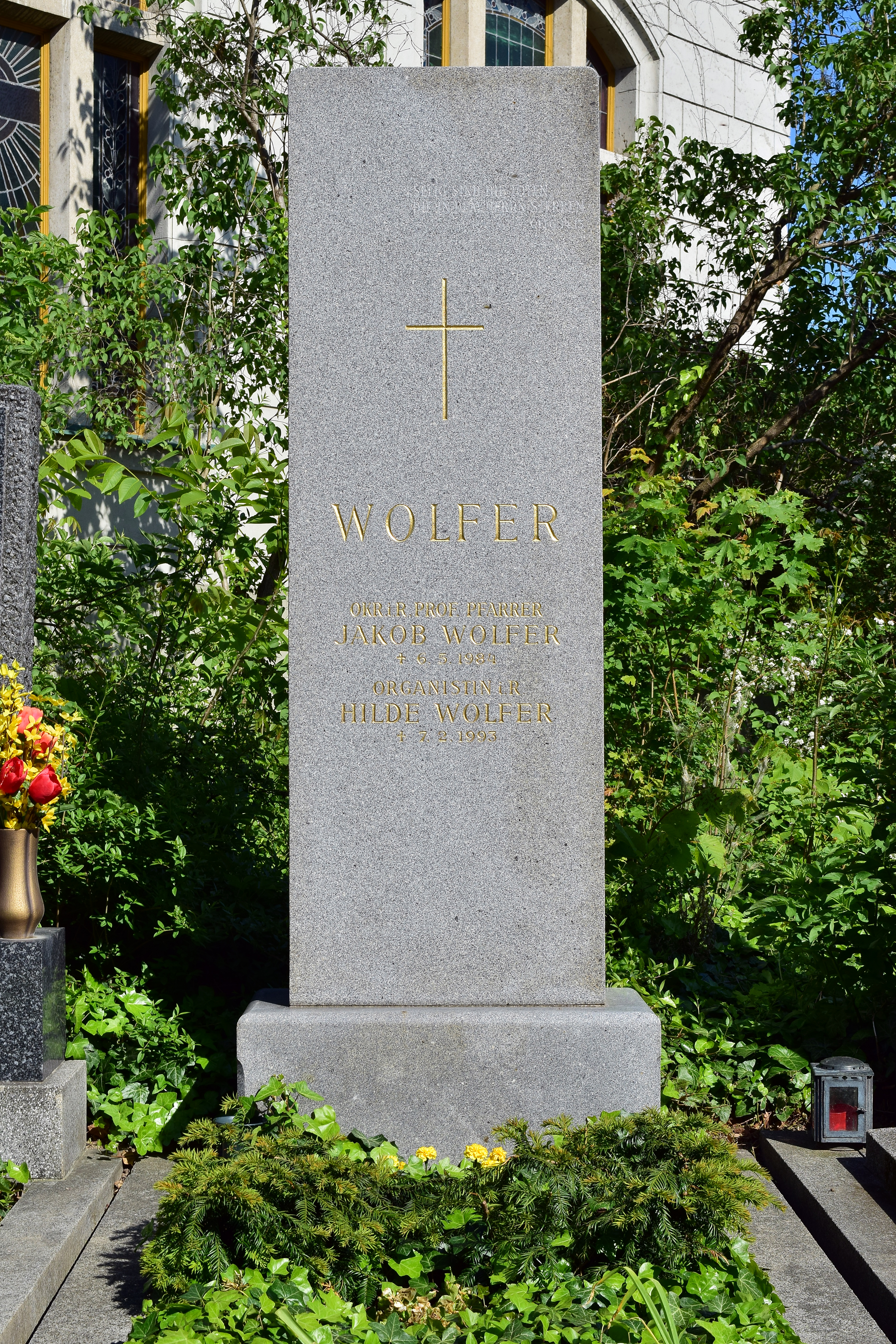 Ehrenhalber gewidmetes Grab von Jakob Wolfer auf dem evangelischen Friedhof im Wiener Zentralfriedhof, Pfarrgräber, Nr. 2